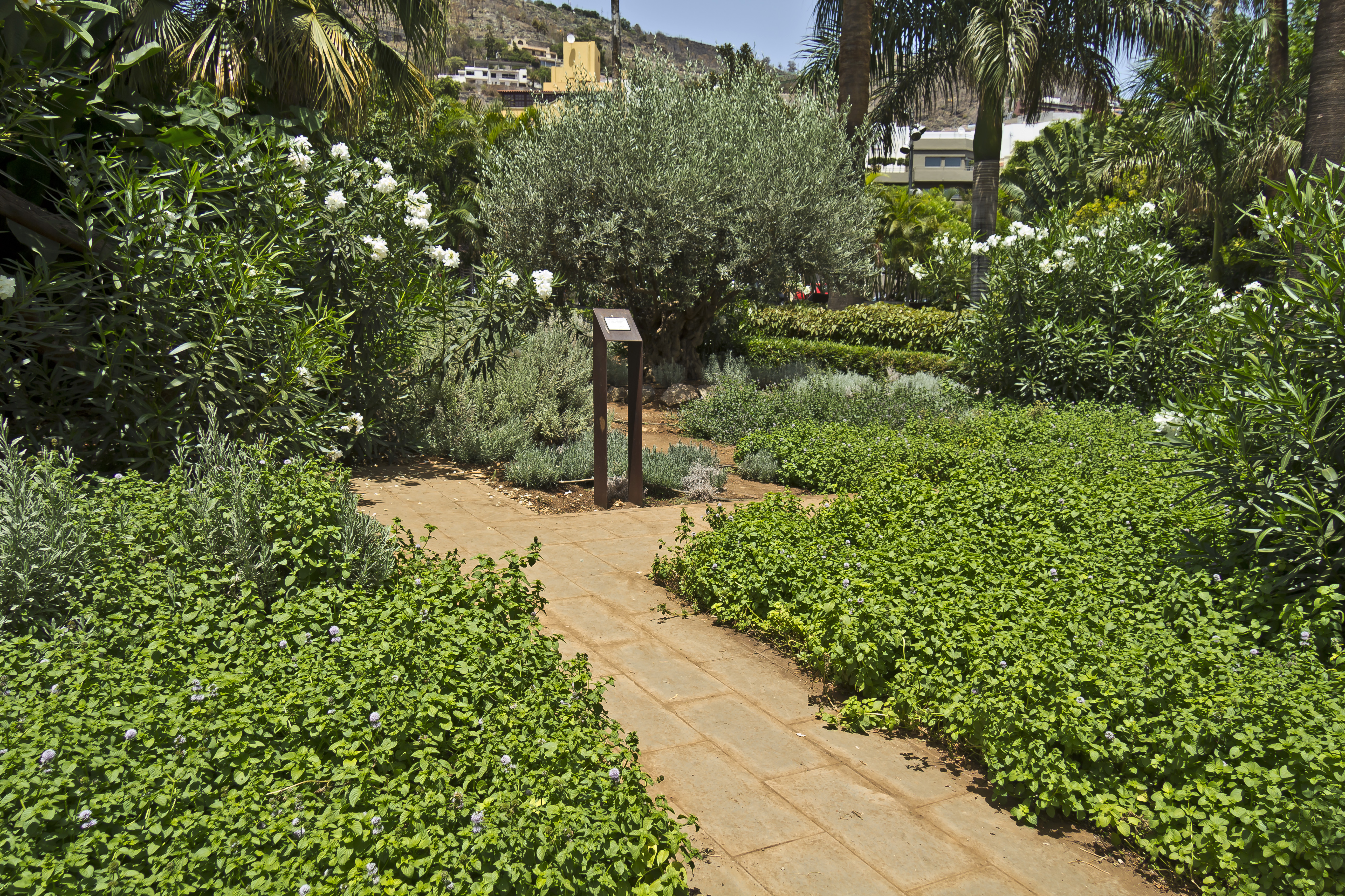 Kräutergarten im Parque García Sanabria in Santa Cruz de Tenerife